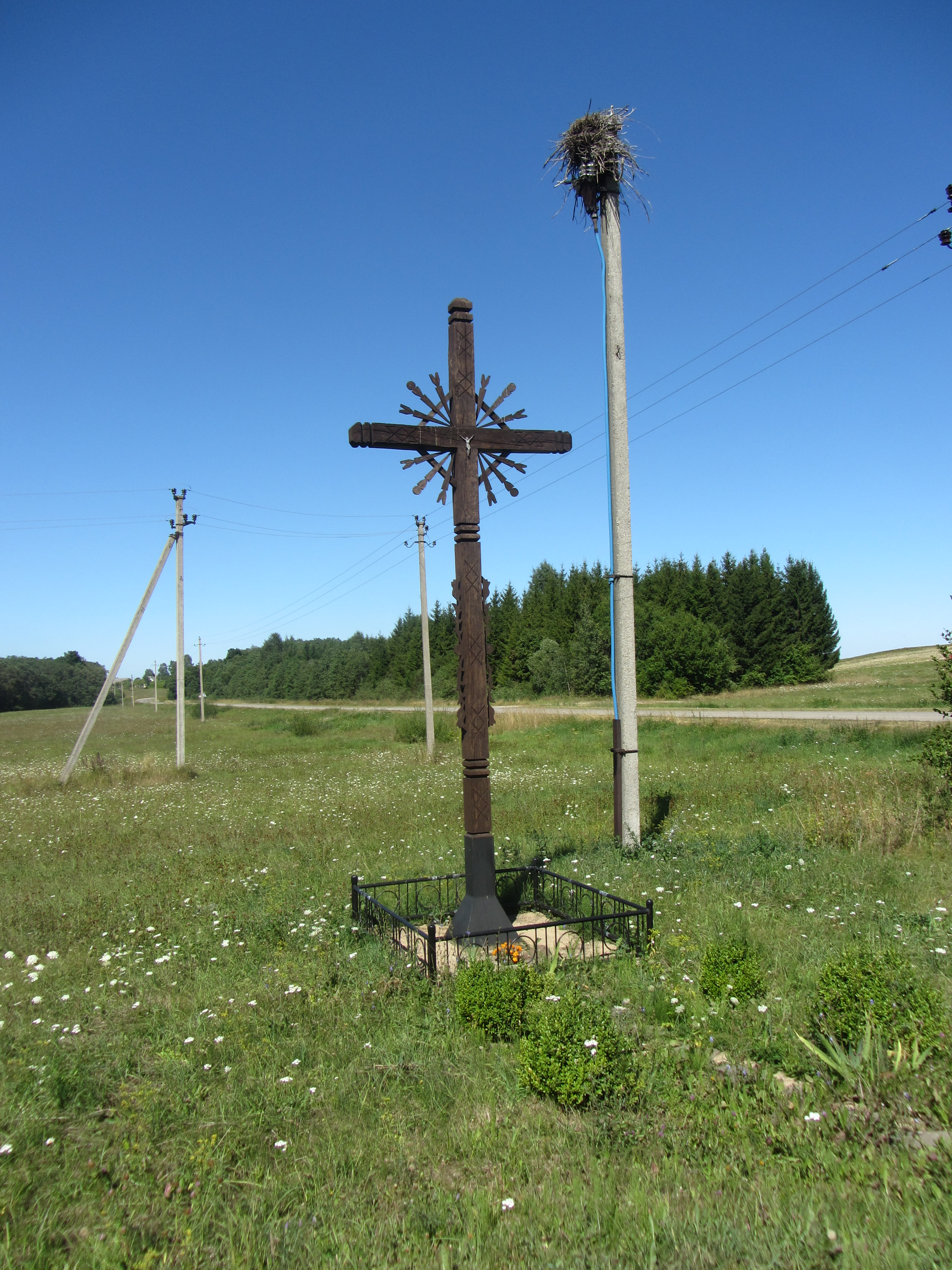 Kupiškio sen., Lithuania